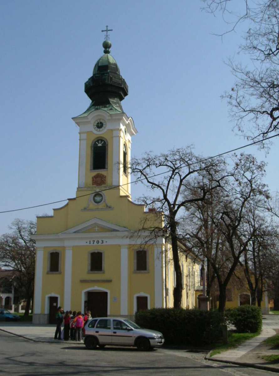 Pilisvörösvár-Hungary. Church Author: Peter Kaboldy, 03.2007. Nagyboldogasszony római katolikus templom